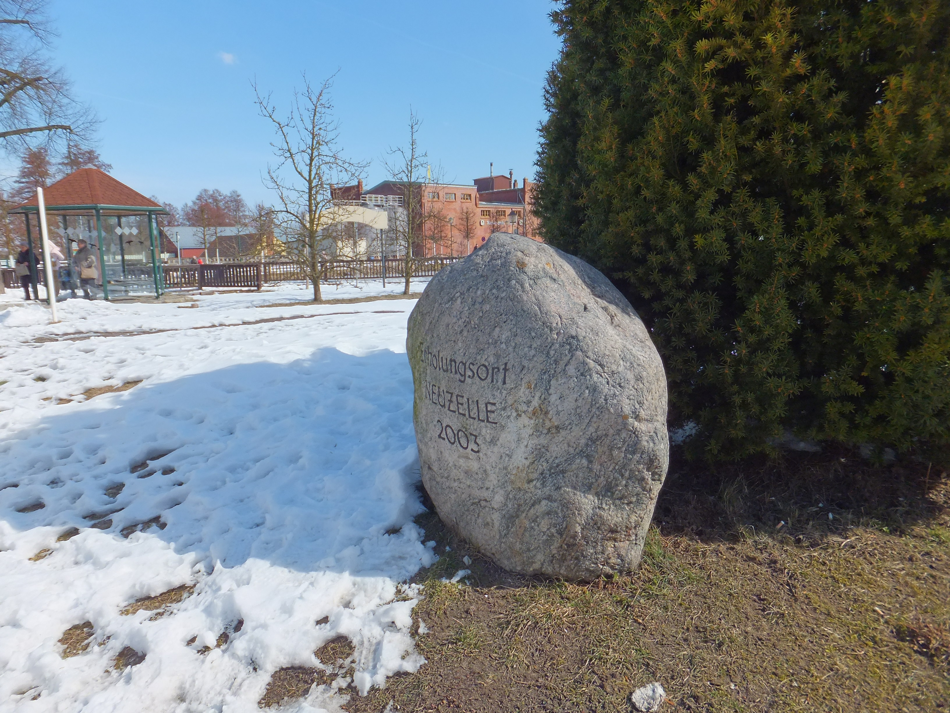 Neuzelle